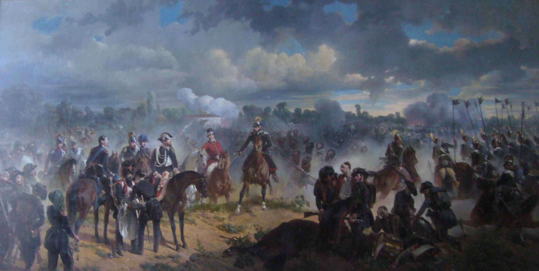 Dipinto della Battaglia di Goito (30 maggio 1848).